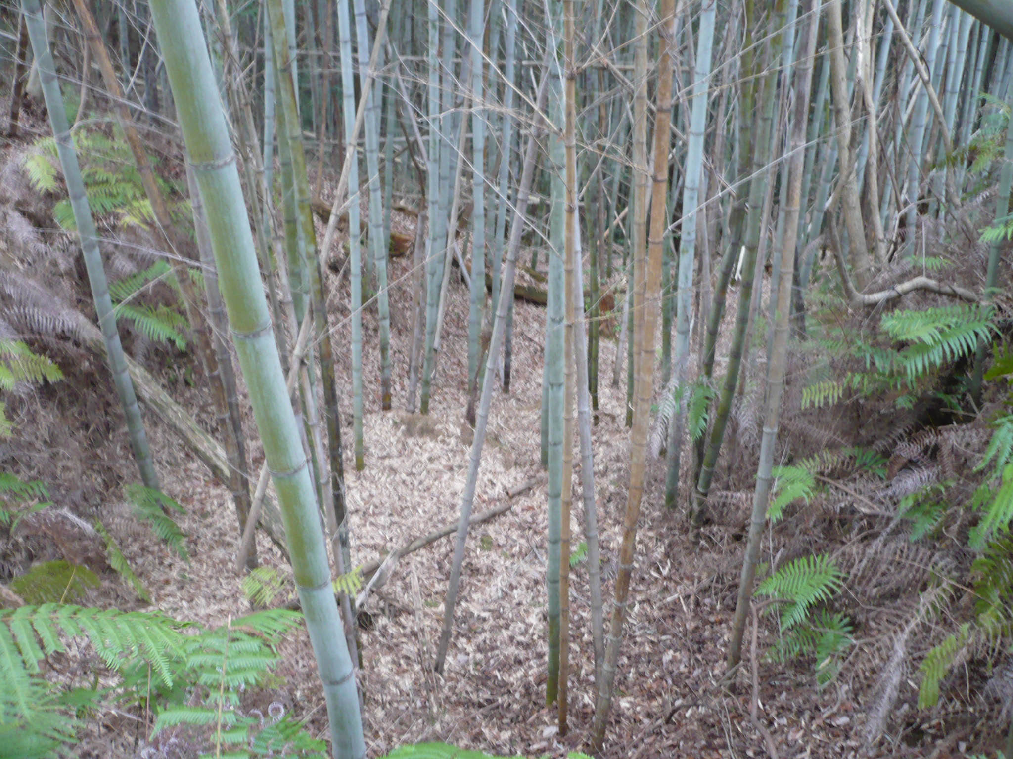 上桜城